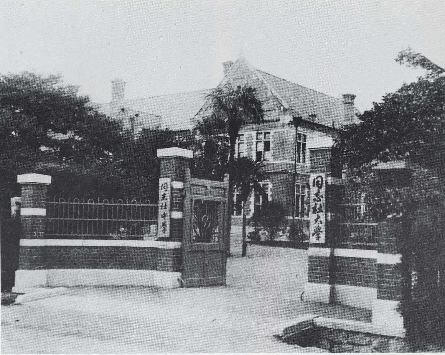 大正時代の同志社大学正門、正面はハリス理化学館